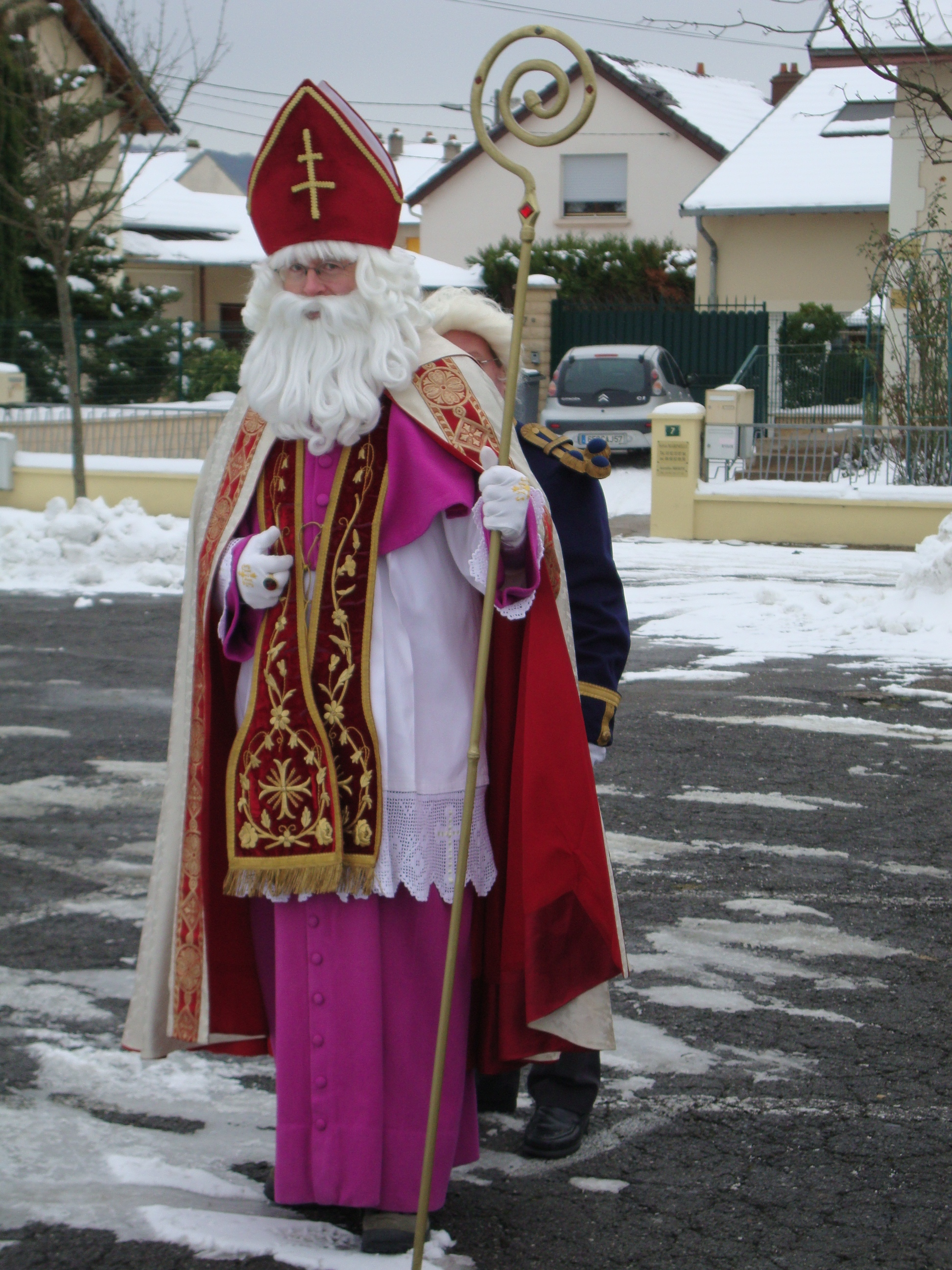 Défilé de la Saint-Nicolas à Hettange-Grande (57)